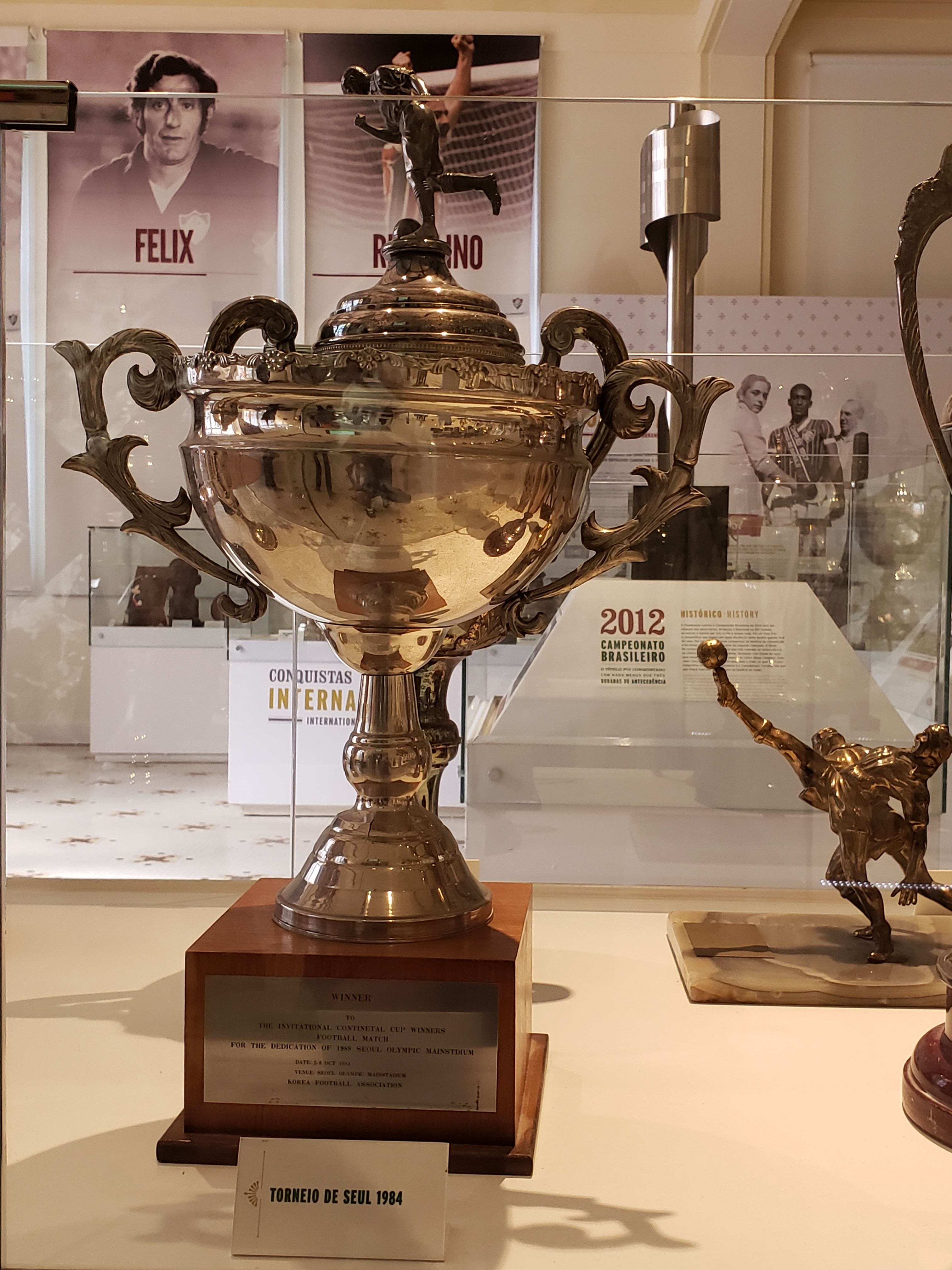 Torneio de Seul de 1984 (2) conquistado pelo Fluminense Football Club, na inauguração do Estádio Olímpico de Seul.